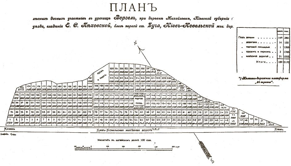 План